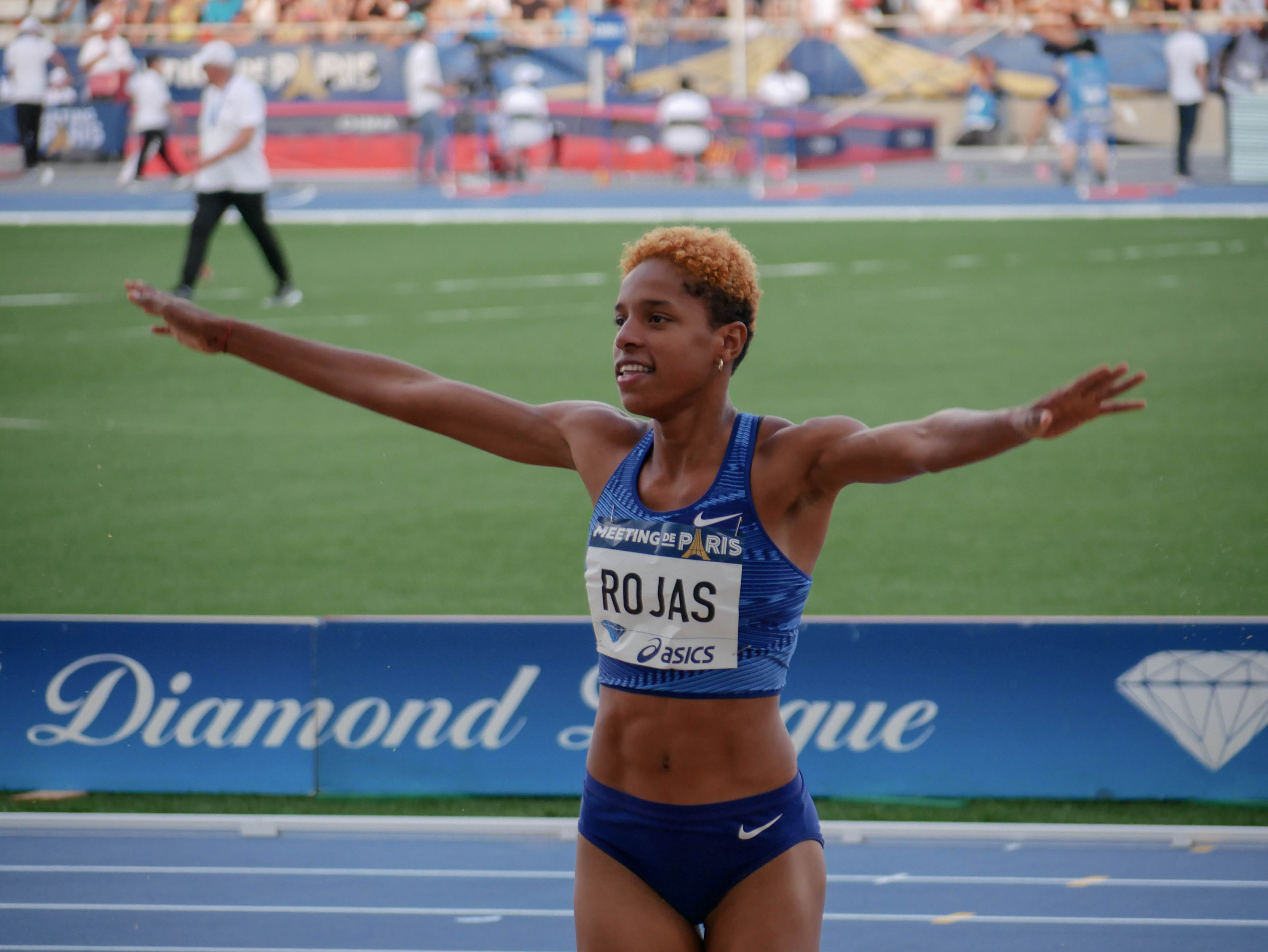 Meeting de Paris 2019 - Compétition d'athlétisme au stade Charlety - 24 août 2019